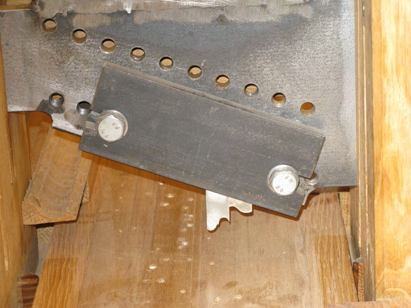 Nærbillede af flammelistehøvlens profiljern. Set på Nationalmuseets møbelkonserveringsværksted i Brede.